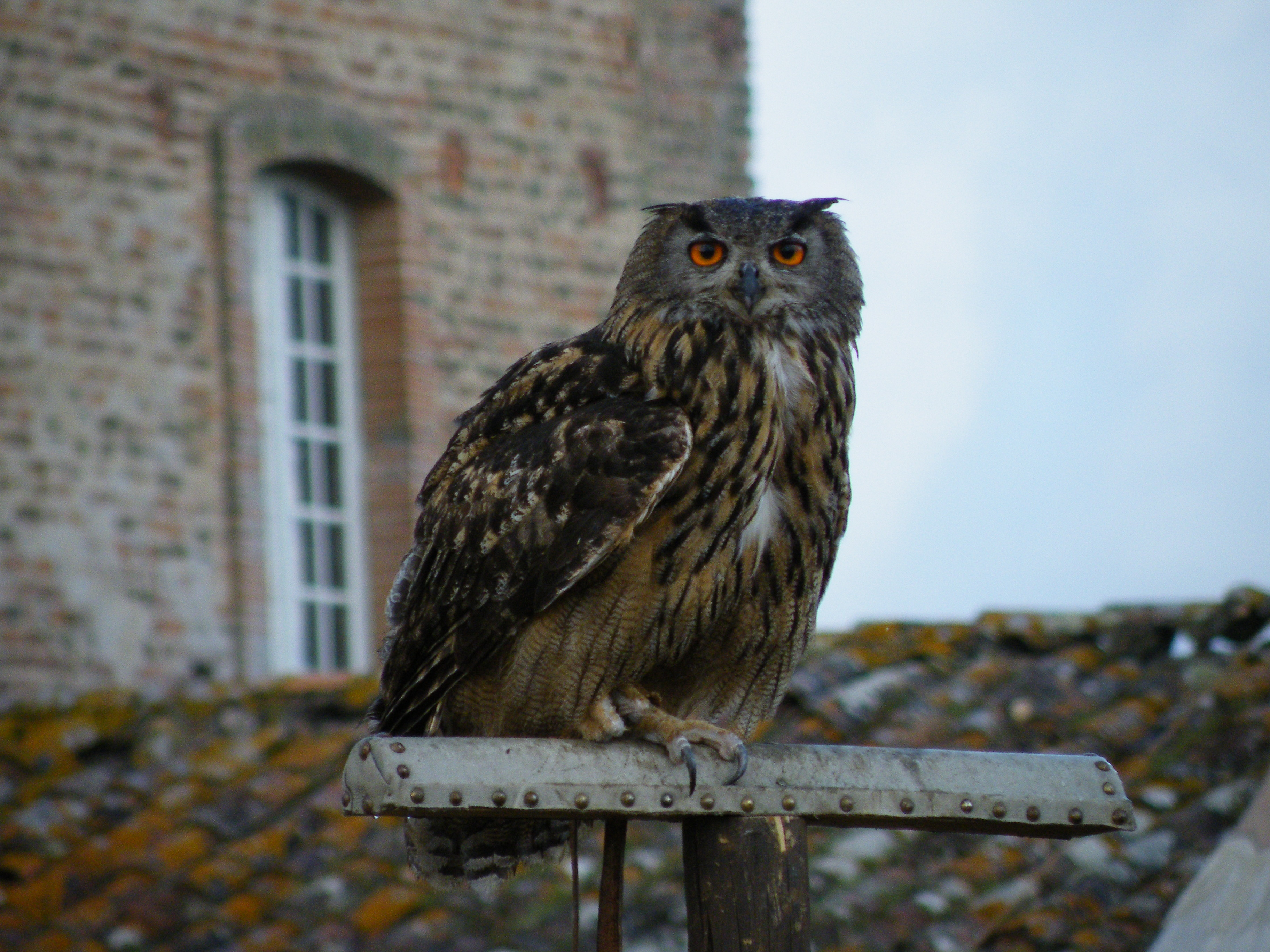 Hibou Grand Duc de la fauconnerie Marche — Photo prise à l'Abbaye de Belleperche pendant les journées du patrimoine 2011